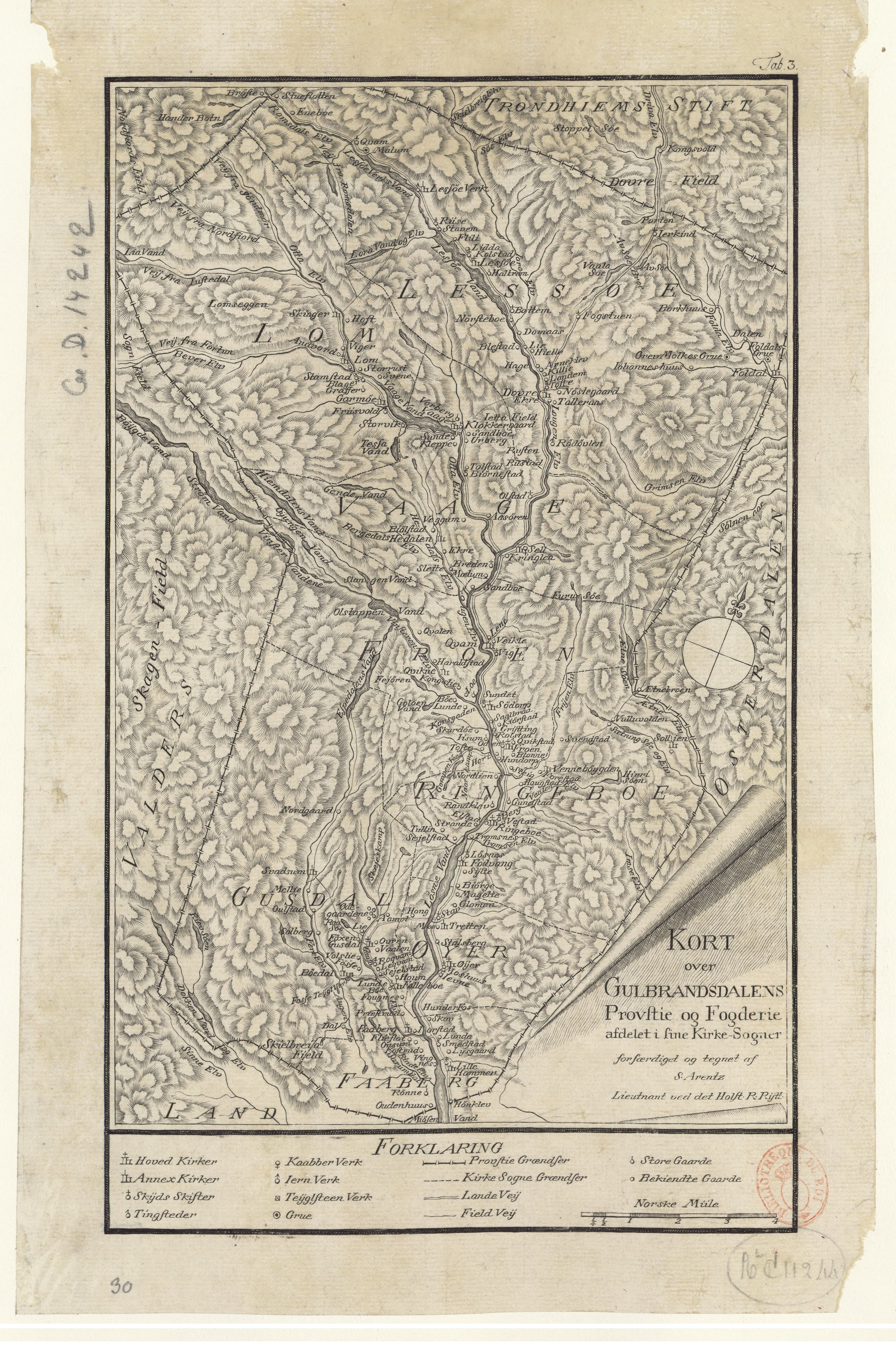 Kort over Gudbrandsdalens Provstie og Fogderie